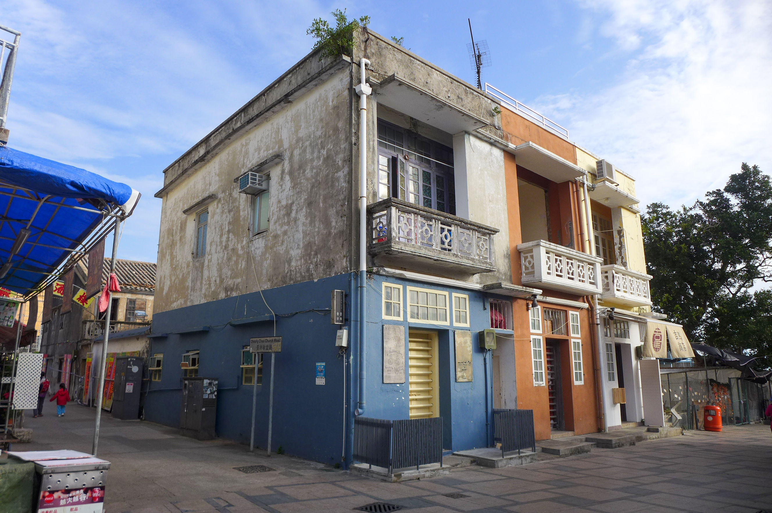 Tung Wan Road No1-3